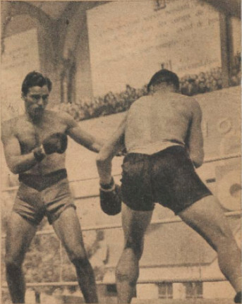 Marcel Cerdan (à gauche) est opposé à Fernand Viez (de dos à droite) le 17 mai 1942 au Grand Palais de Paris.